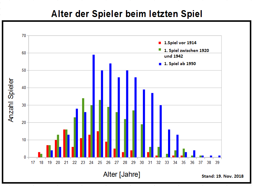 Altersverteilung der deutschen Fußballnationalspieler beim Abschied in 3 Perioden, Stand 11. 8. 2010